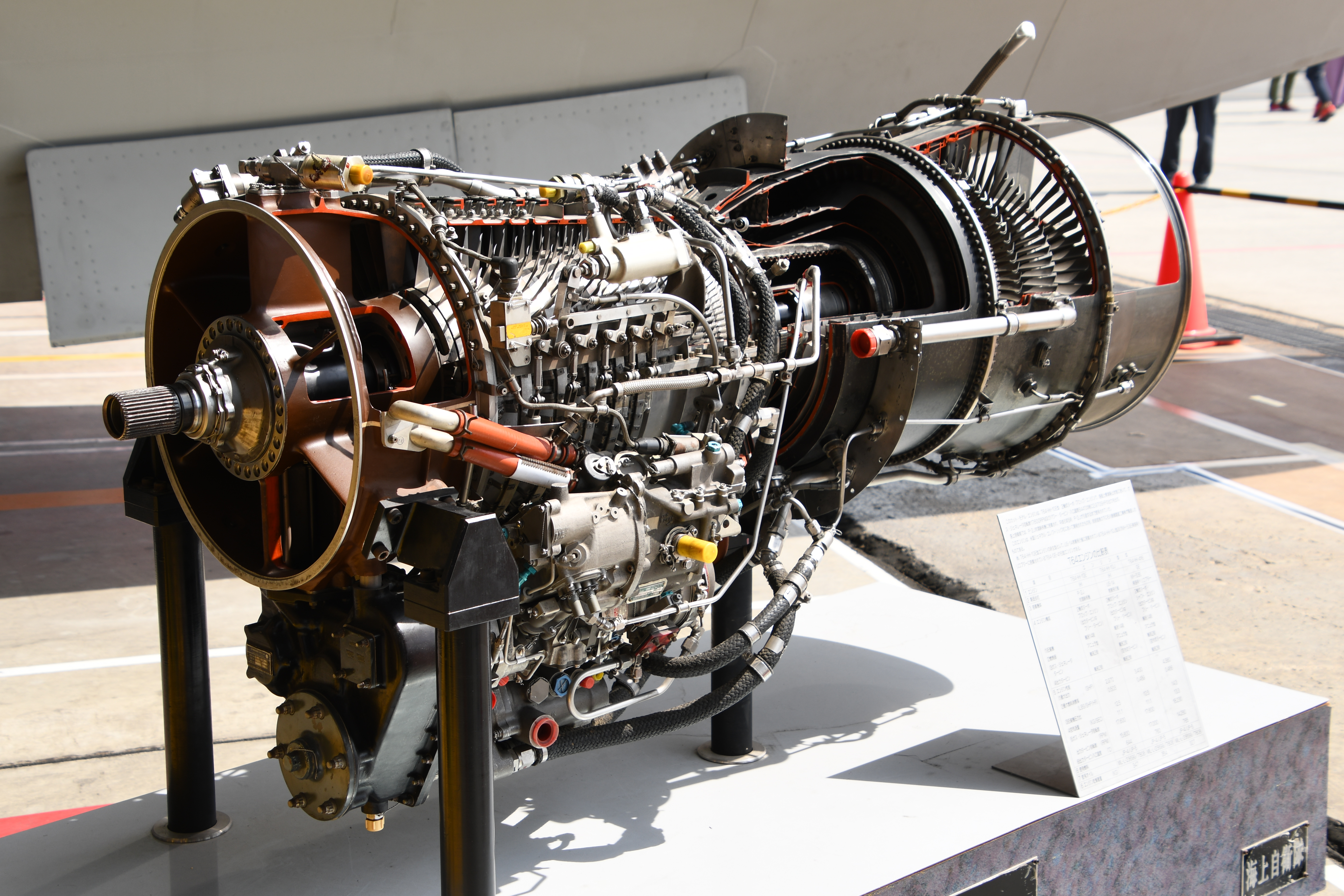 海上自衛隊 US-1A用T64-IHI-10Eターボプロップ・エンジン（カットモデル） 左前面。2019年5月5日 米海兵隊岩国航空基地にて。